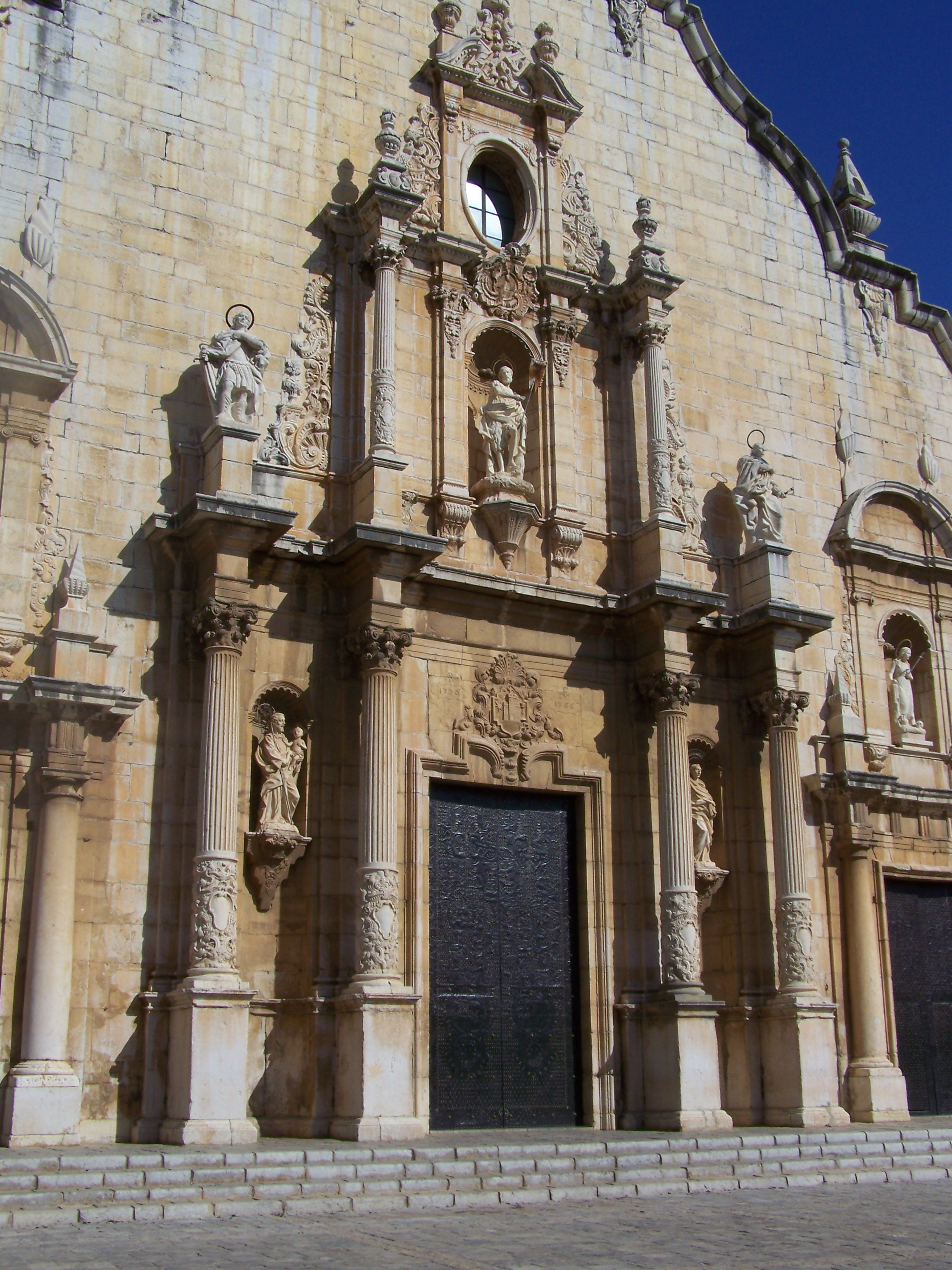 Pórtico Iglesia de San Juan Bautista, Alcalá de Xivert, Castellón